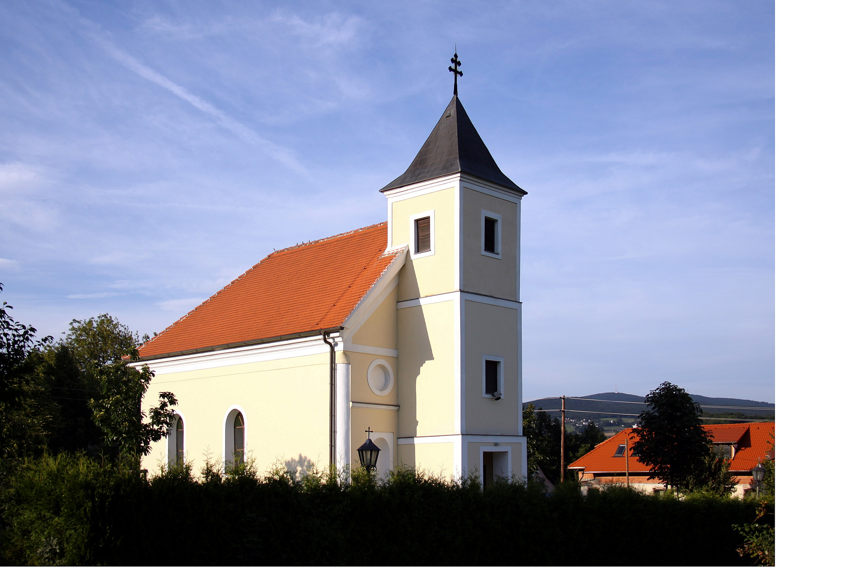 Weiden bei Rechnitz - Filialkirche hl. Theresia in Allersdorf Object location47° 18′ 05.35″ N, 16° 18′ 59.81″ E